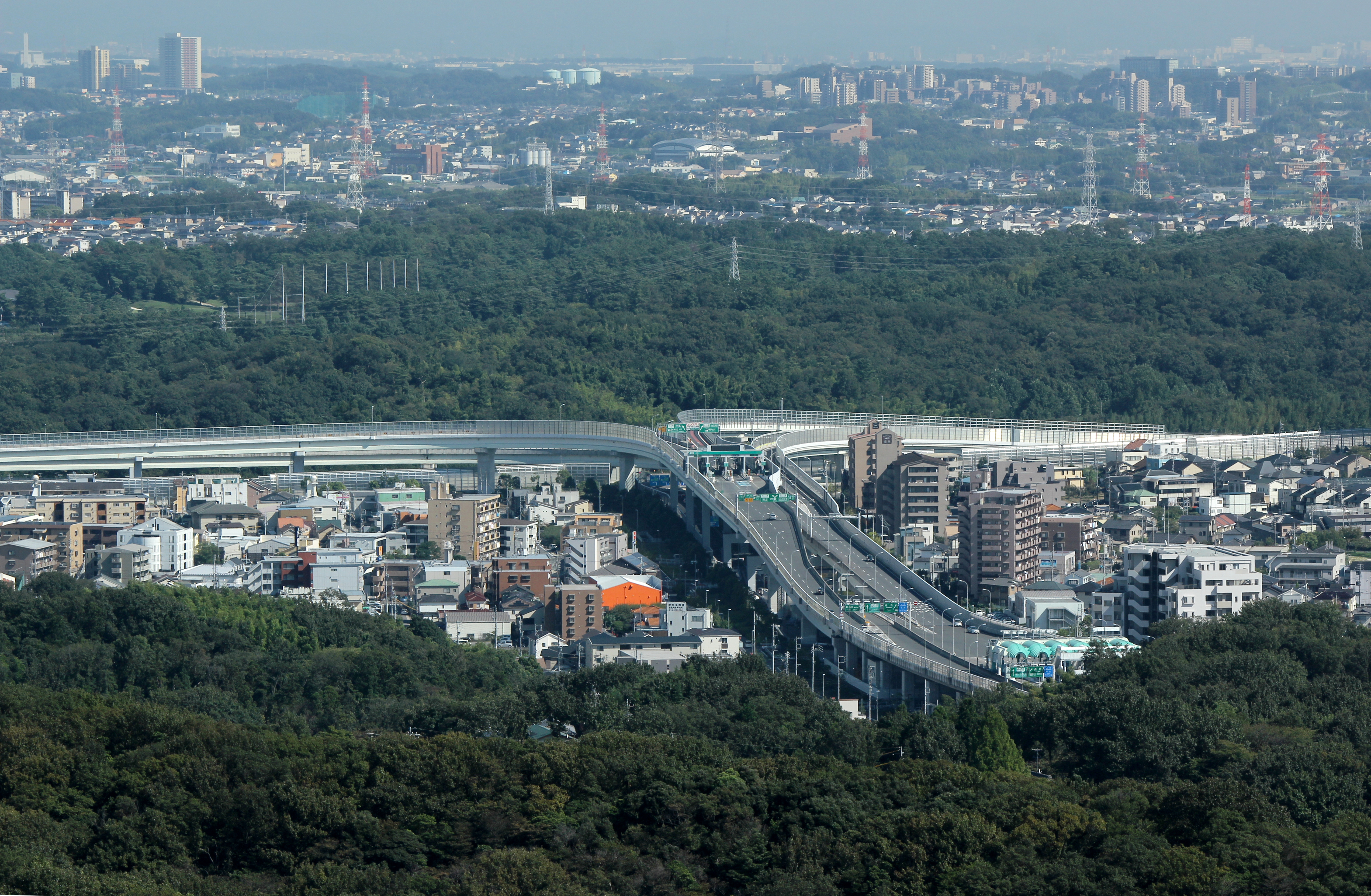 名高速東山線終点の高針JCT